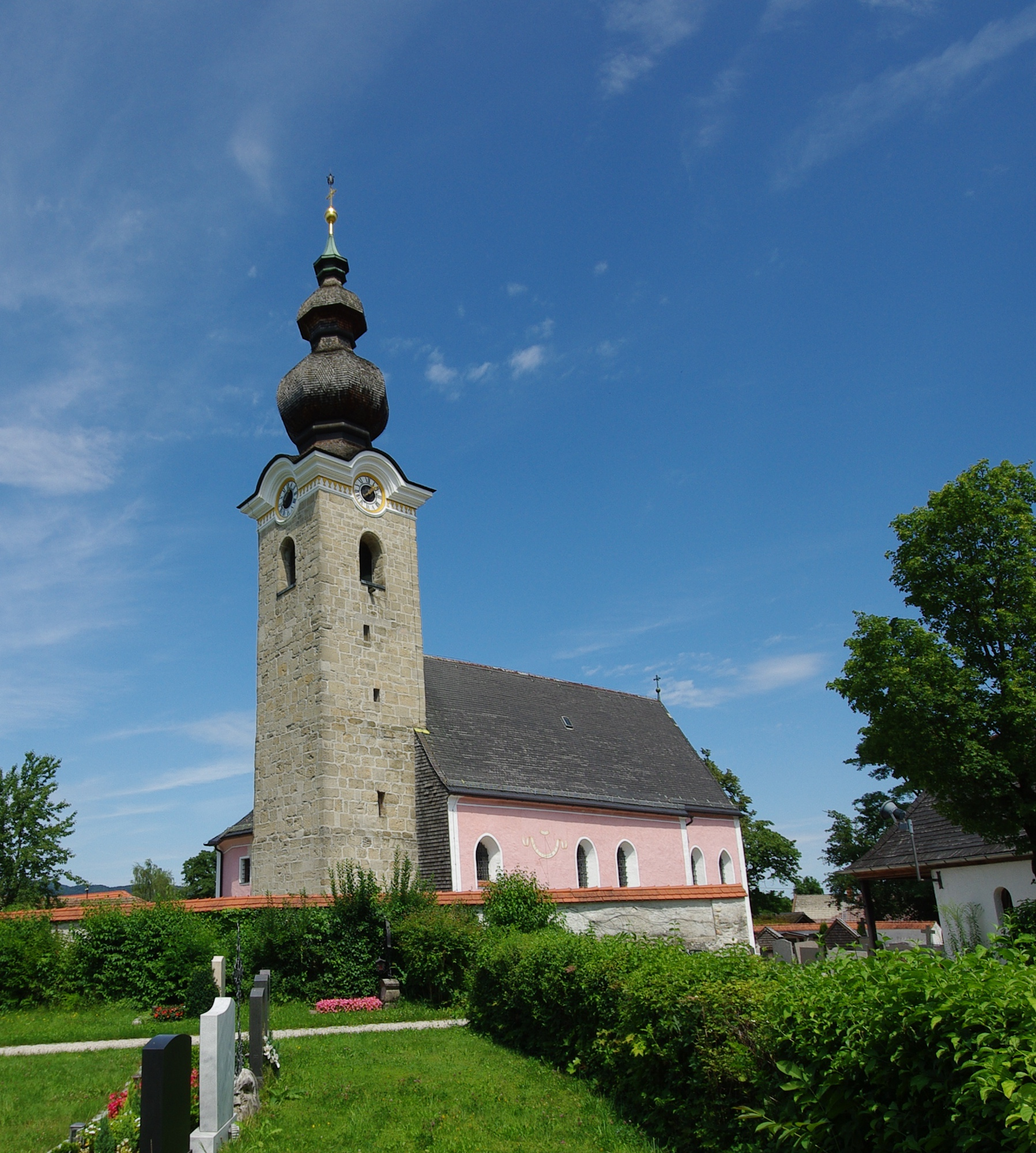 Schloßberg 6, 83435 Bad Reichenhall (Ortsteil Marzoll); Kath. Pfarrkirche St. ValentinThis is a photograph of an architectural monument.